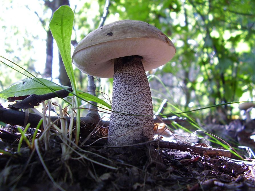 Nyárfa érdestinorú